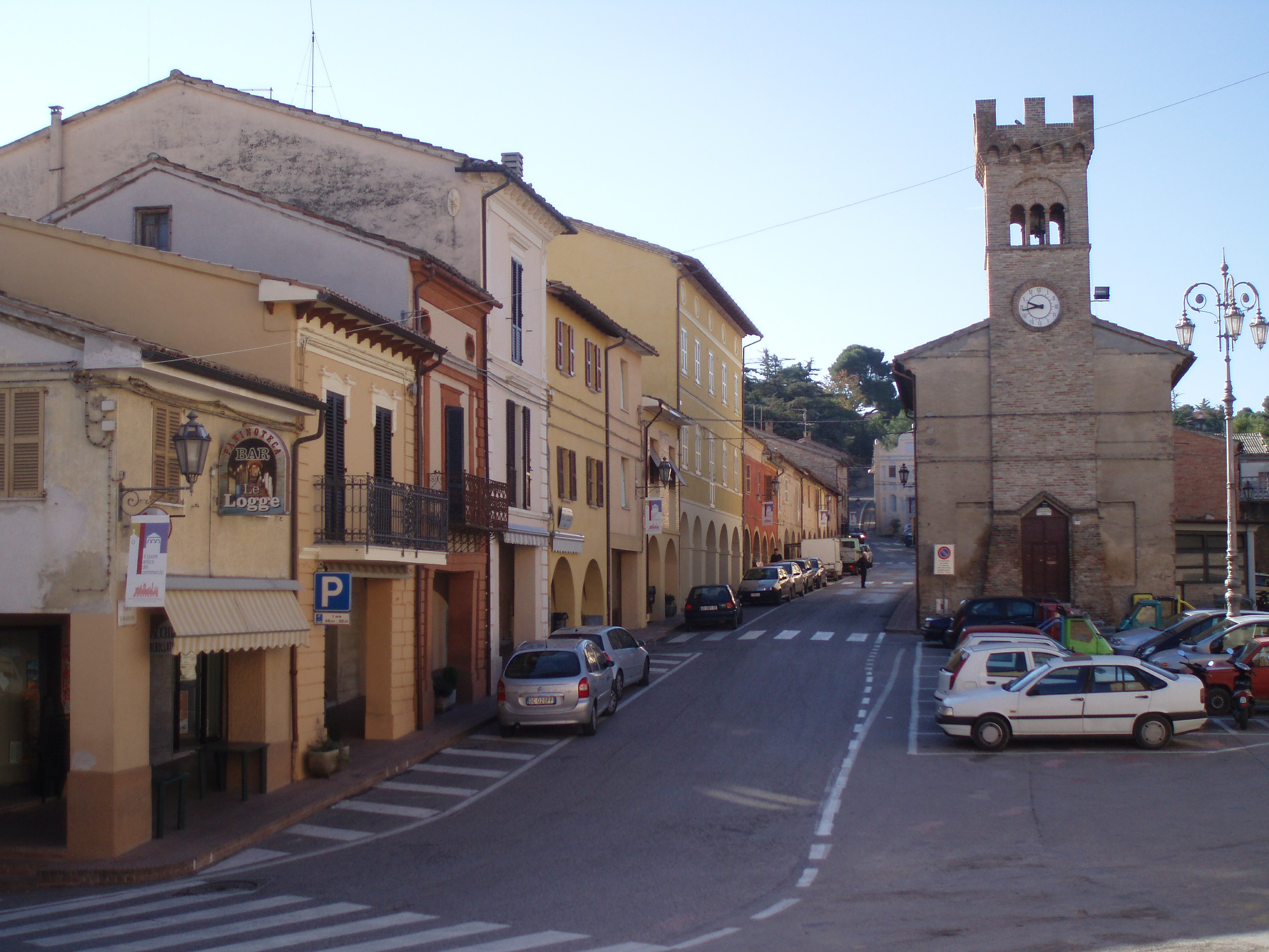 Piazza Vittorio Emanuele II con la torre civica e le logge - Castelleone di Suasa